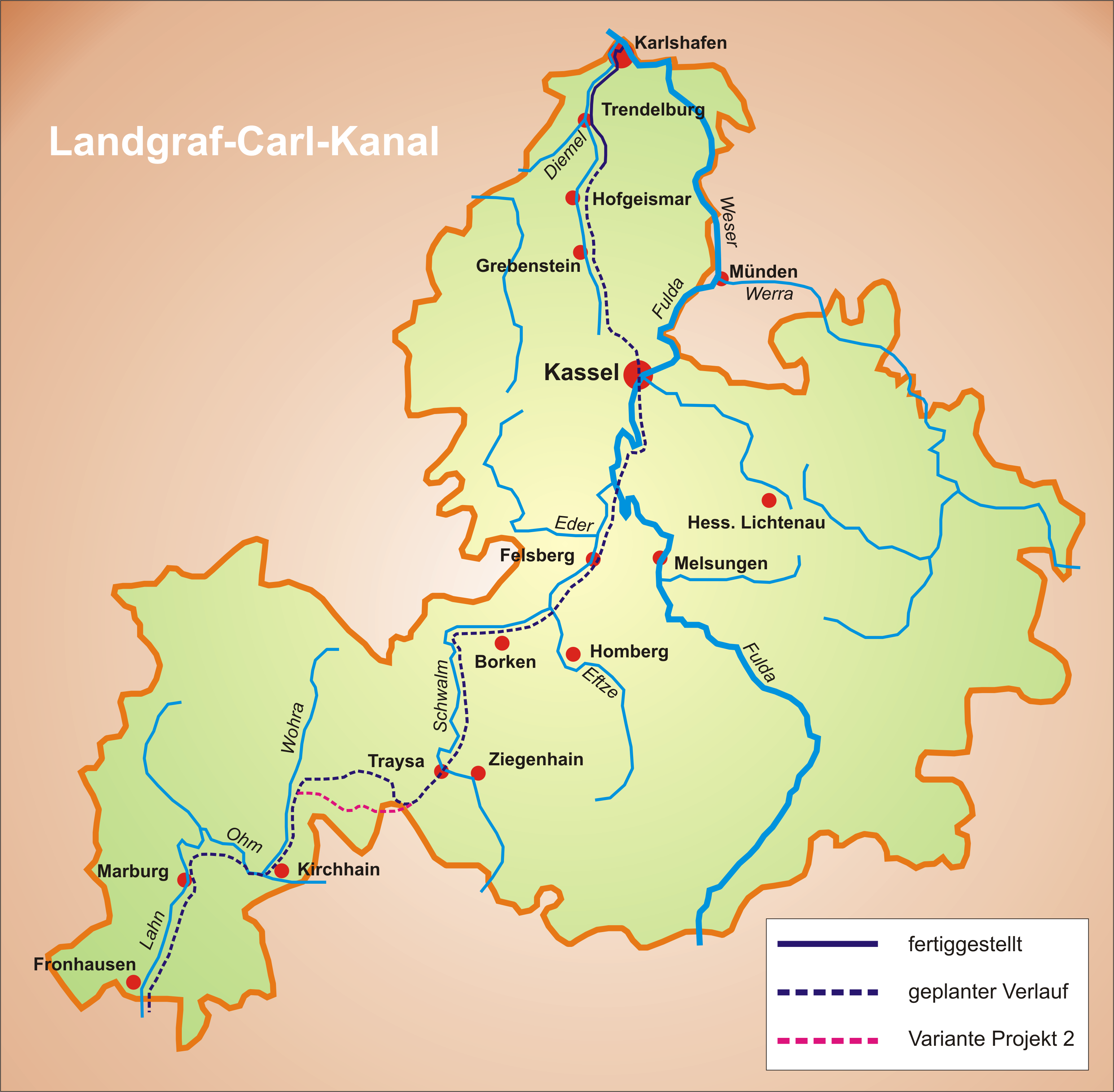 geplanter Verlauf des Landgraf-Carl-Kanals um 1700 Quelle: selbst erstellt Fotograf/Zeichner: presse03 Datum: 14.03.2006